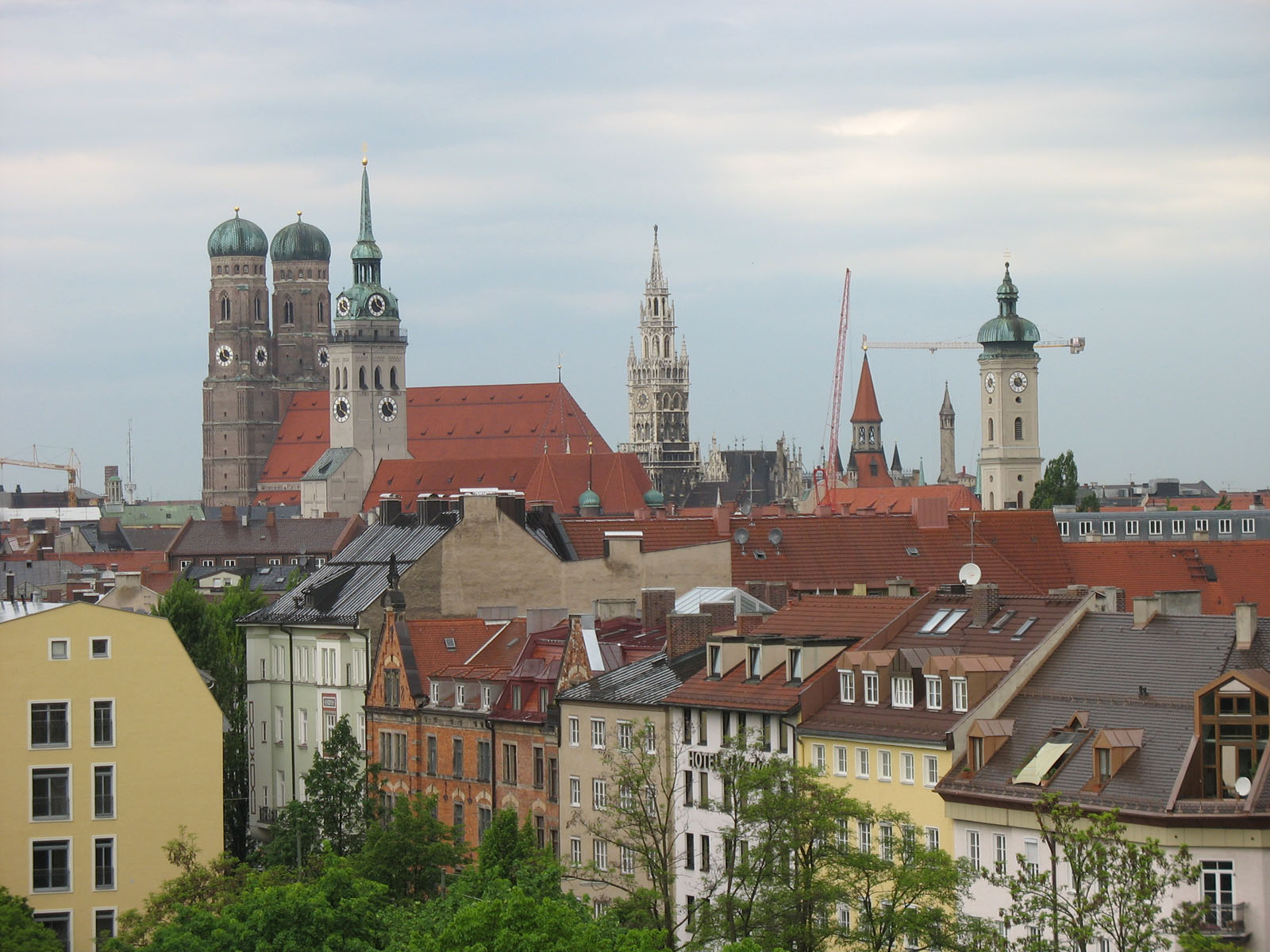 Ein Blick auf die Altstadt von München mit der Frauenkirche im Hintergrund